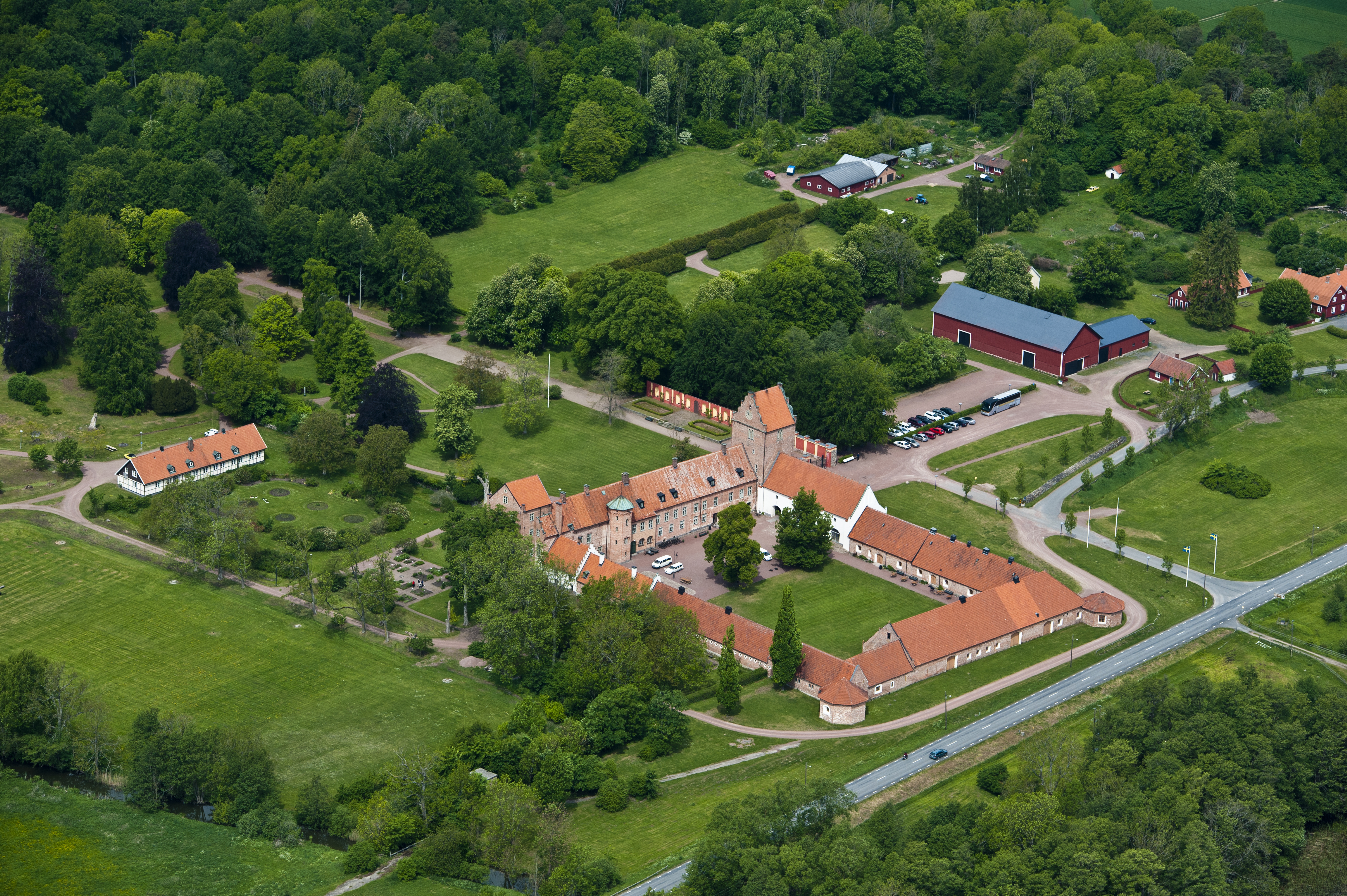 Bäckaskogs slott